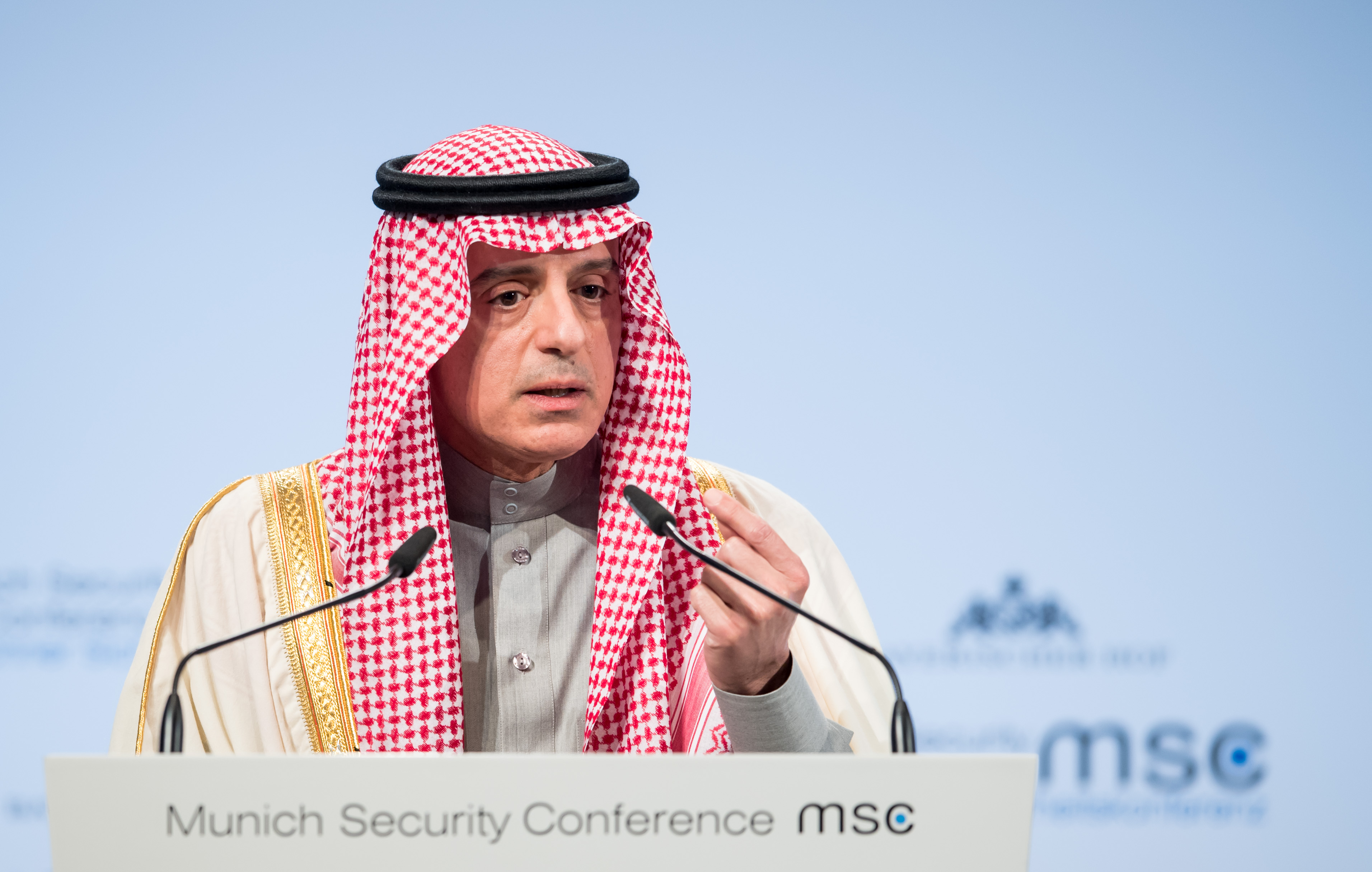 Adel bin Ahmed Al-Jubeir während der Münchener Sicherheitskonferenz 2018